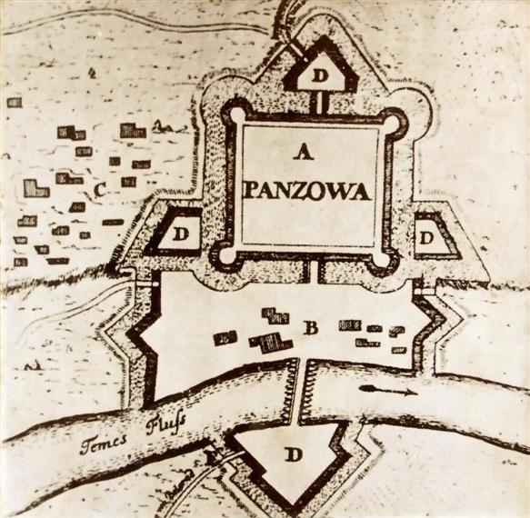 Srpski (latinica): Plan pančevačke tvrđave iz 18. veka